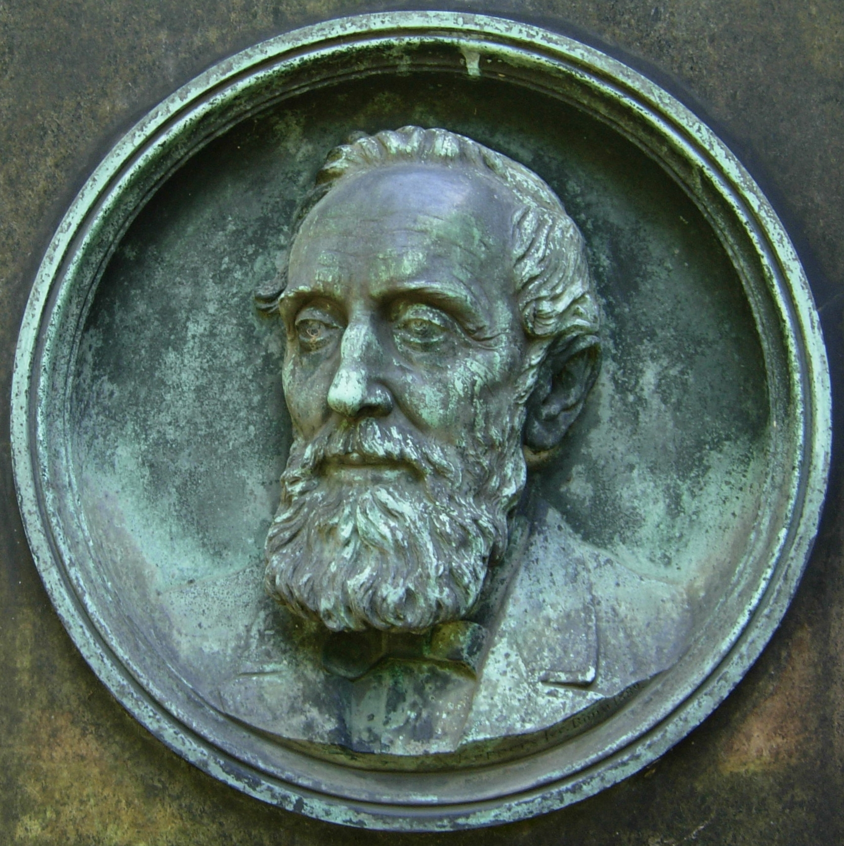 Albert Hermann Küppers: Bronze-Medaillon (1889) für den Mediziner Hugo Rühle (laut Grabstein Rühle, nicht Ruehle) auf dem Alten Friedhof Bonn